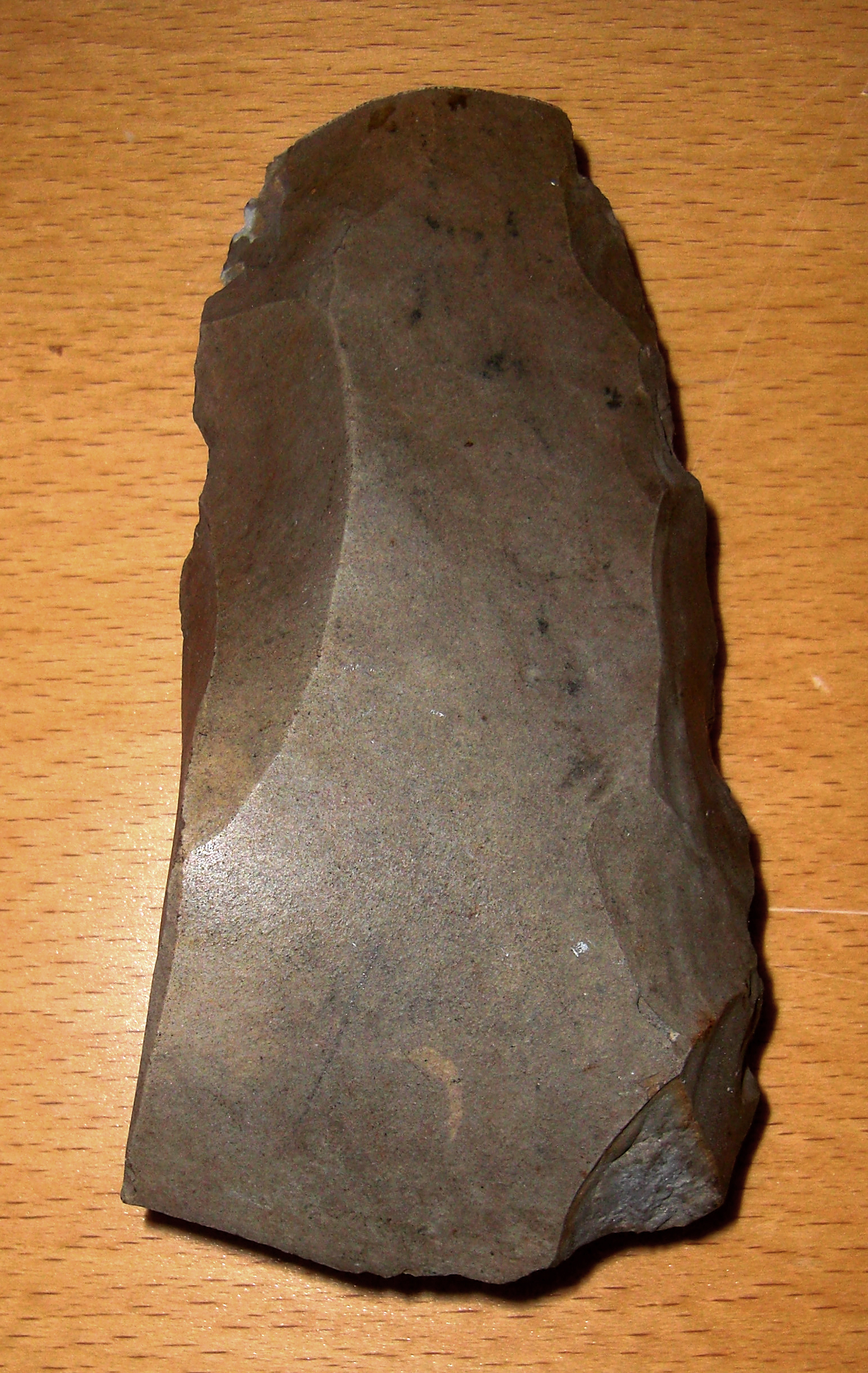 En mesolitisk skivyxa utan fyndort. Yxan tillhör Falbygdens museum och har inventarienummer 2M16-2581.